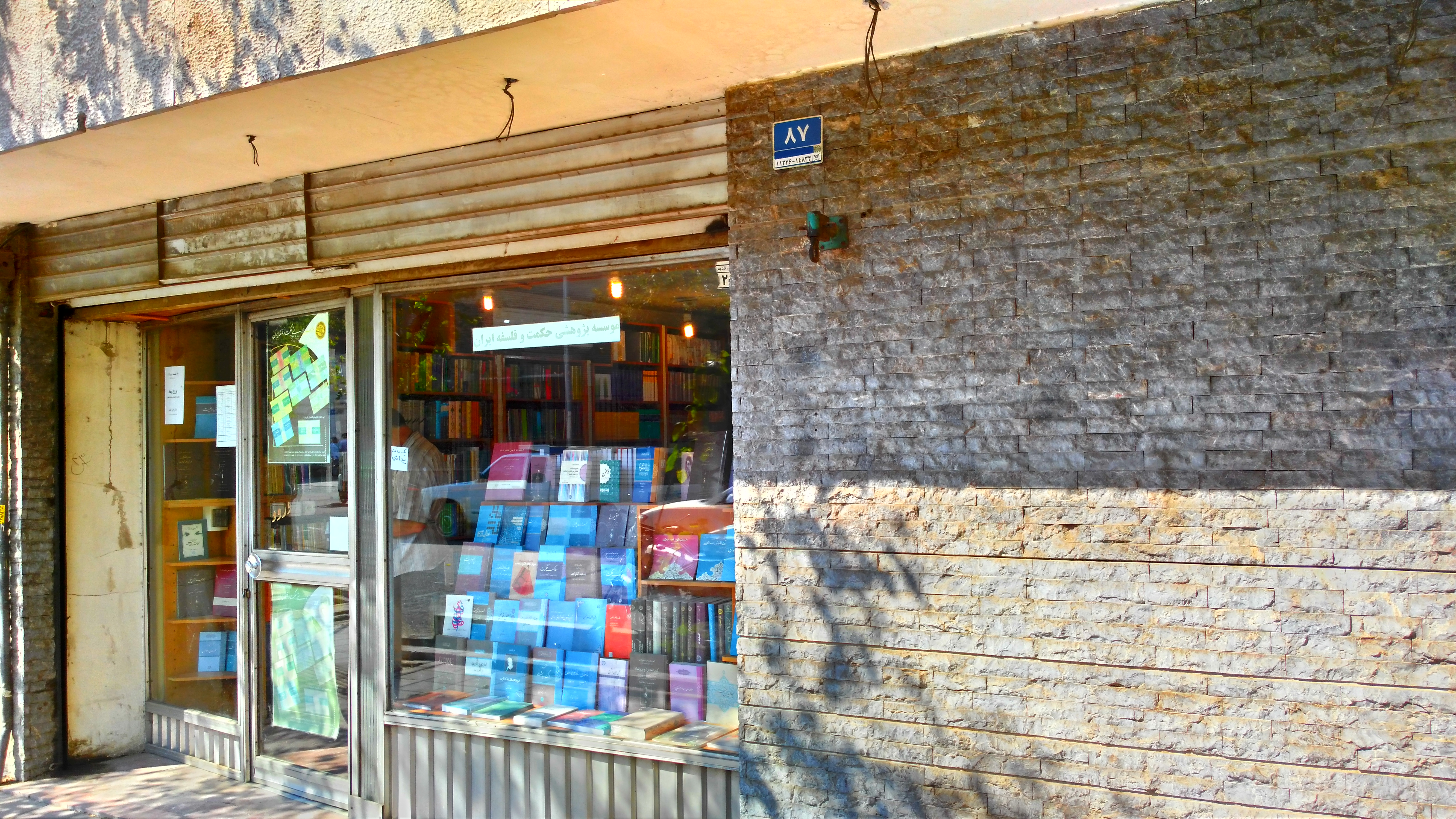 انجمن حکمت وفلسفه ایران